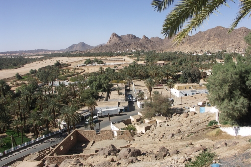 Djanet, Algerie (Wilfrid Schueller - Avril 2006)